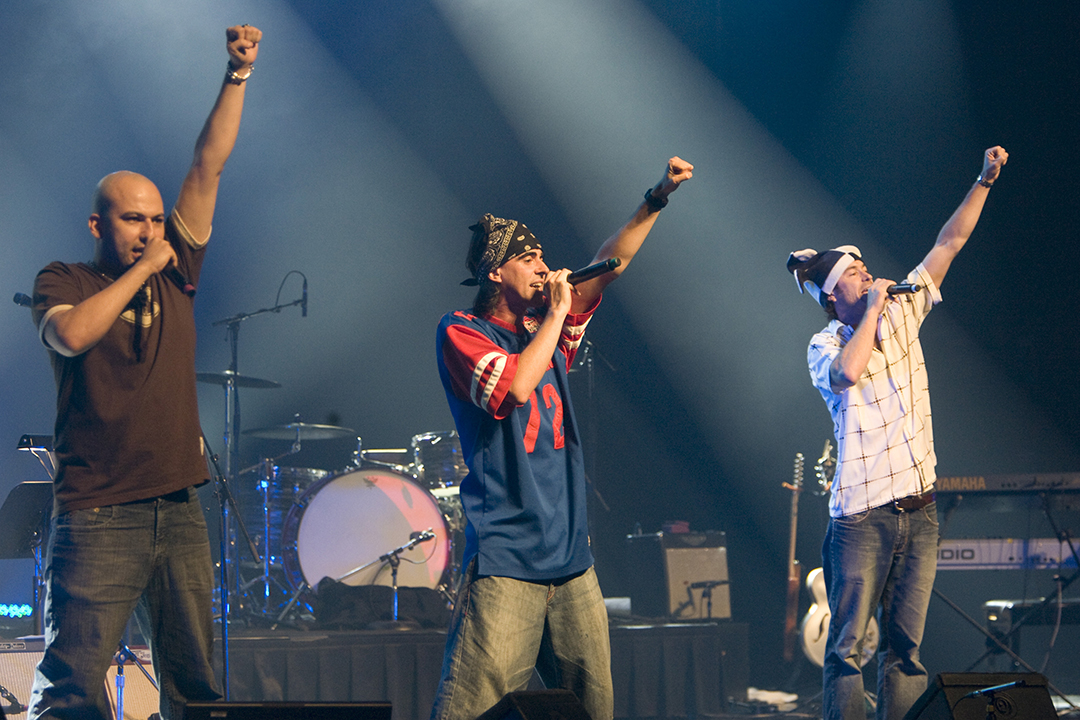 le groupe québécois Loco Locass en concert